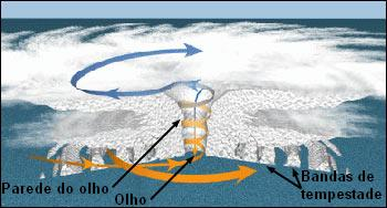 Estrutura de um Ciclone tropical. Derivated work from Hurricane structure graphic.jpg with Portuguese dialogs. Image courtesy NOAA, but taken from NASA Earth Observatory website.